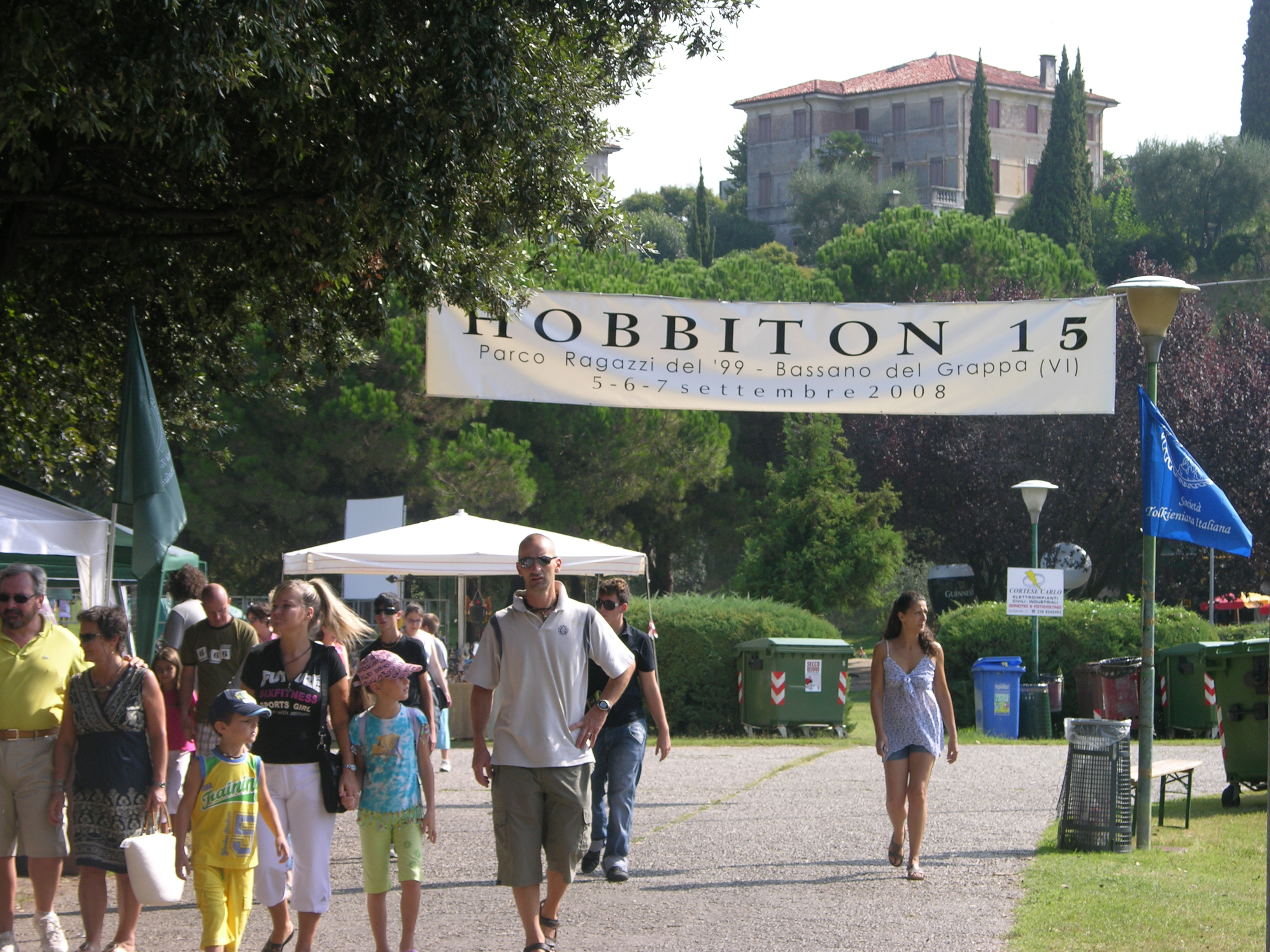 Hobbiton15, Società Tolkieniana Italiana